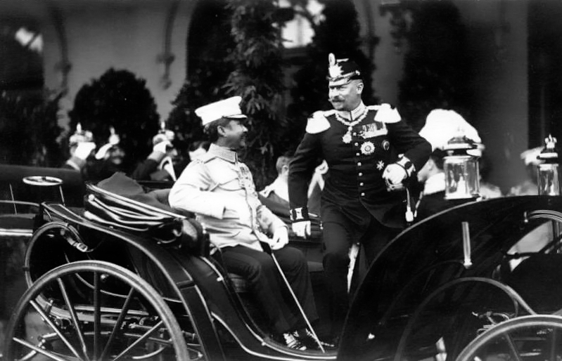 Besuch König von Chulalongkorn in Braunschweig bei Herzog-Regent Johann Albrecht Aug 1907